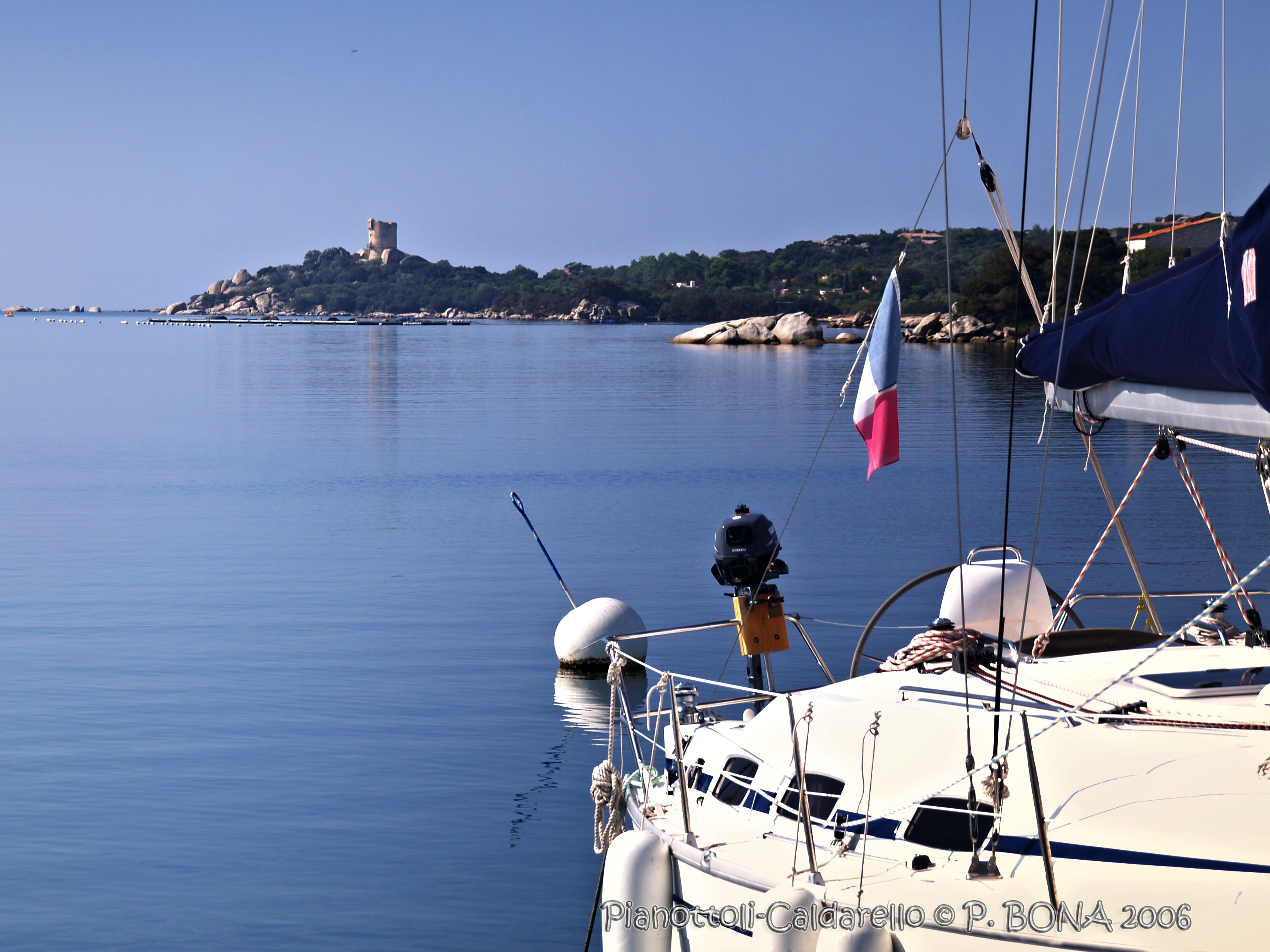 Pianotolli-Caldarello (Corse) - Tour de Figari ou de Caldarello, génoise, du XVIe siècle. MH